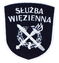 Oznaka SW - ustawa o SW z dn. 26/04/1996 roku